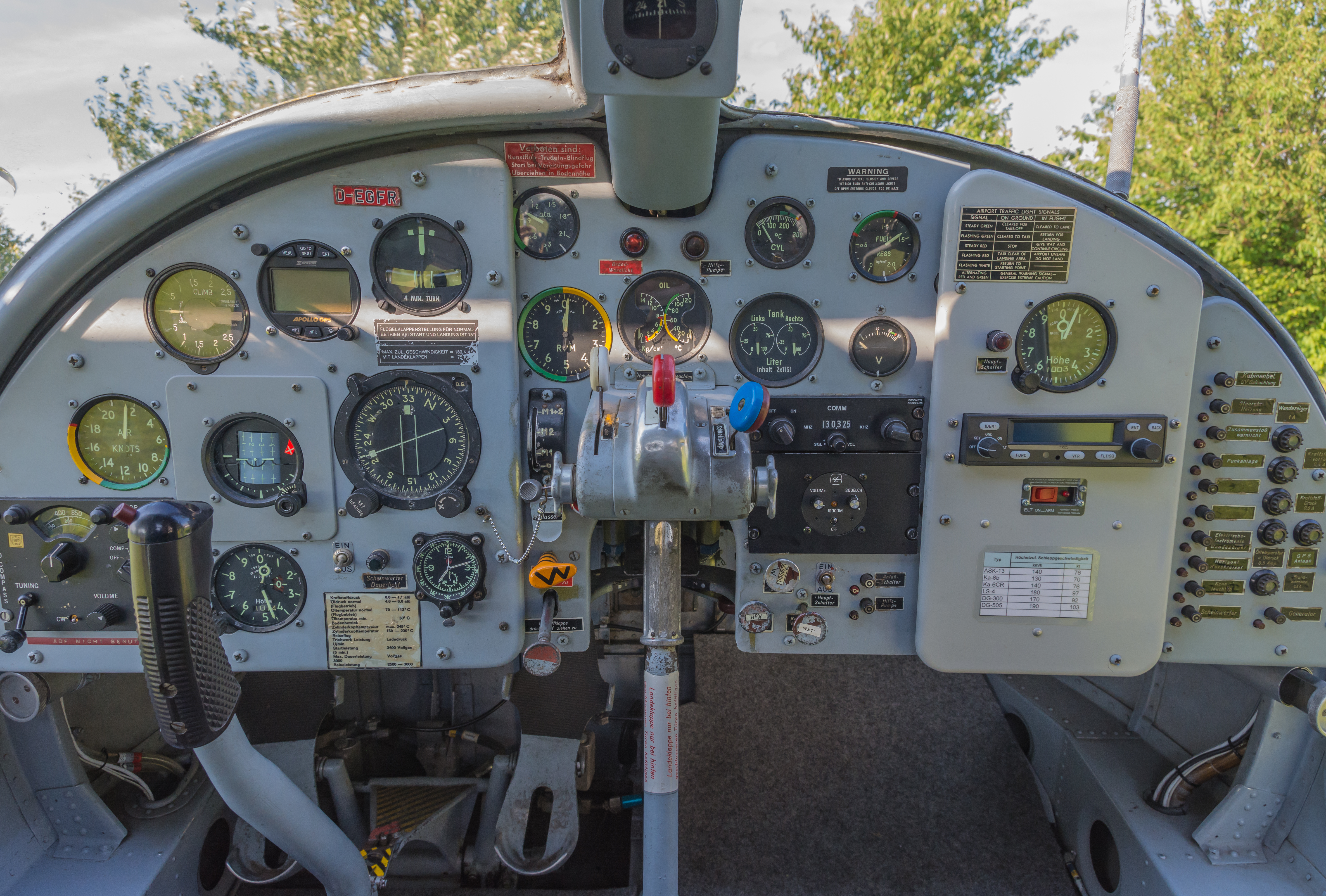 Das ist das Cockpit einer DO-27, einer ehemaligen Bundeswehrmaschine, die jetzt vom Warener Luftsportverein e. V. instandgehalten wird. The making of this document was supported by the Community-Budget of Wikimedia Germany.